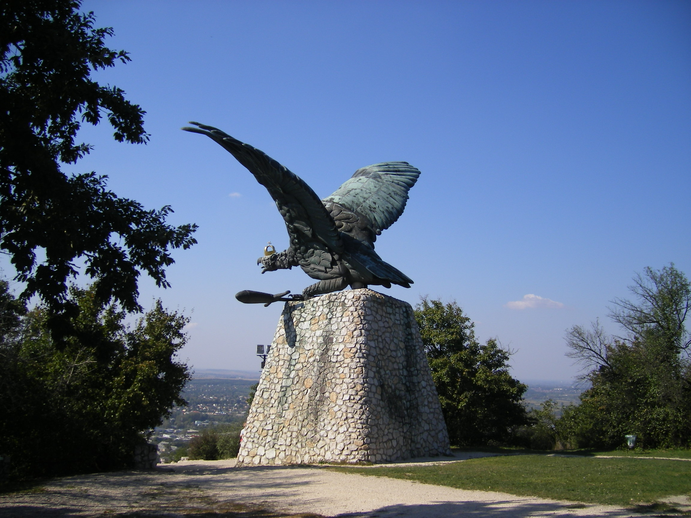 Tatabánya - Turulszobor a Kő-hegyen